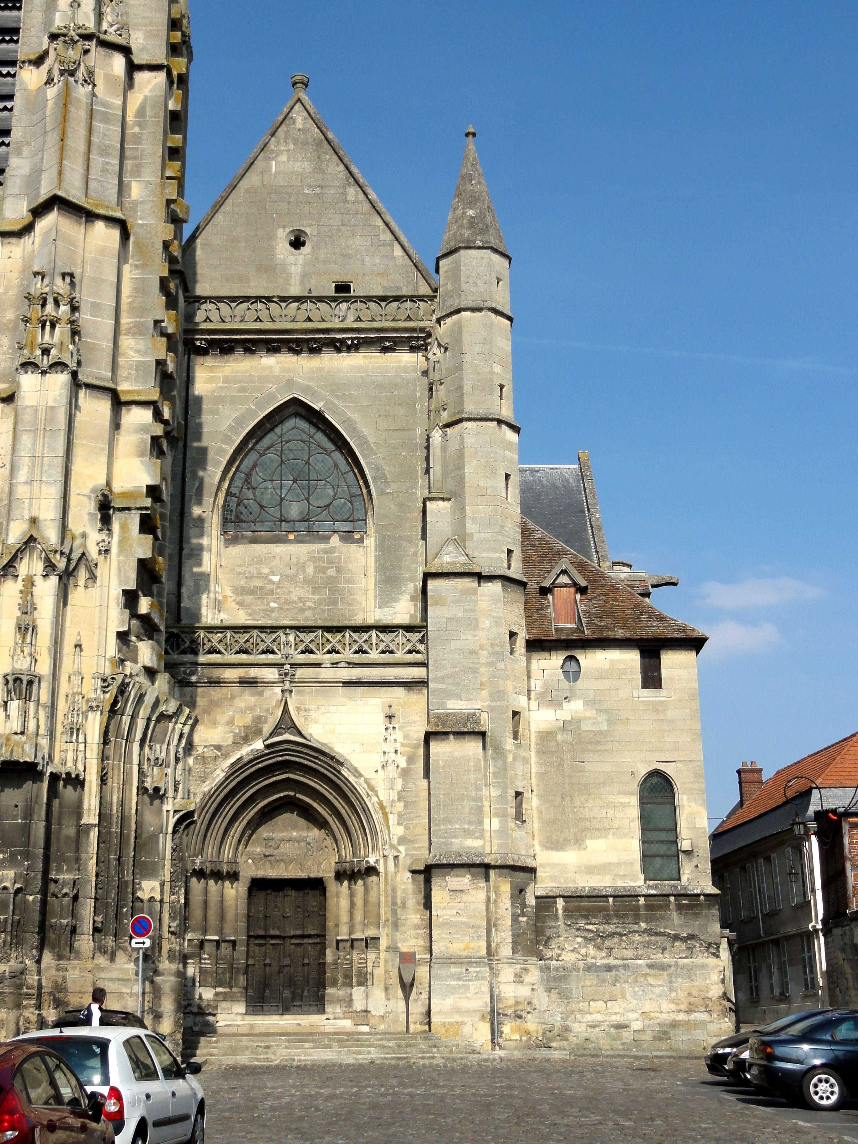 Façade occidentale de la nef.